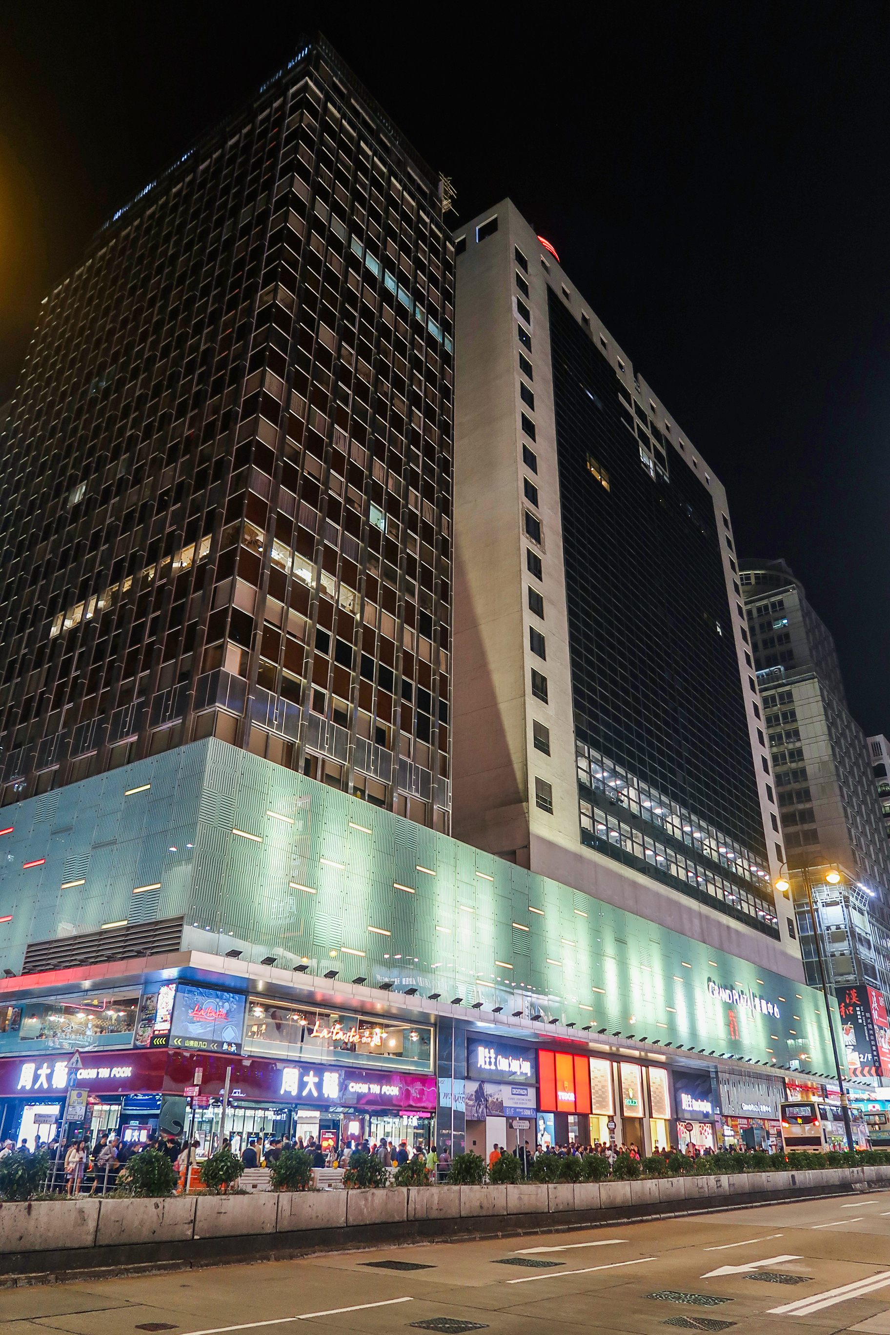 Grand Plaza (Hong Kong)